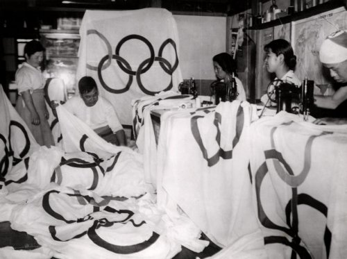 Olympische spelen voorbereidingen. Het vervaardigen achter de naaimachine van Olympische vlaggen voor de Olympische Spelen van 1940 in Japan, 24 september 1936. De organisatie van de Olympische Winterspelen van 1940 werd in eerste instantie toegekend aan Sapporo in Japan. In juli 1938, gaven de Japanners echter aan dat zij niet in staat zouden zijn om de Spelen te organiseren vanwege de oorlog die Japan uitvocht met China.